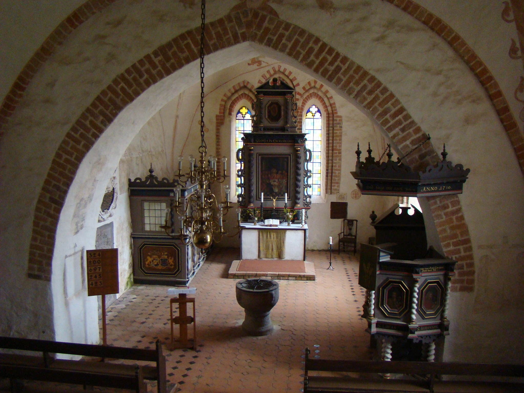 Kirche in Groß Gievitz. Foto: Peter Schmelzle 2011